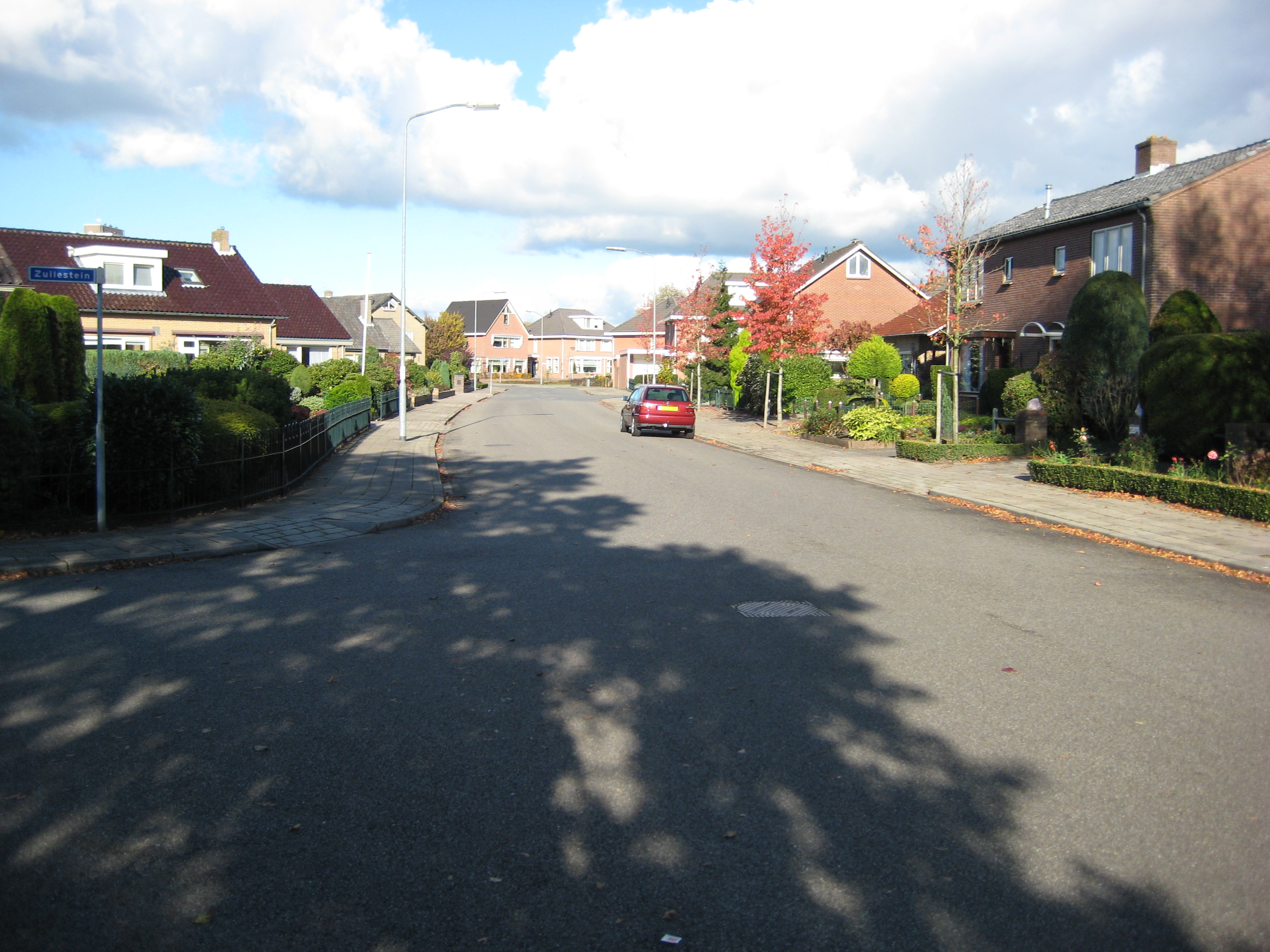 Moderne boomloze straat in Ede